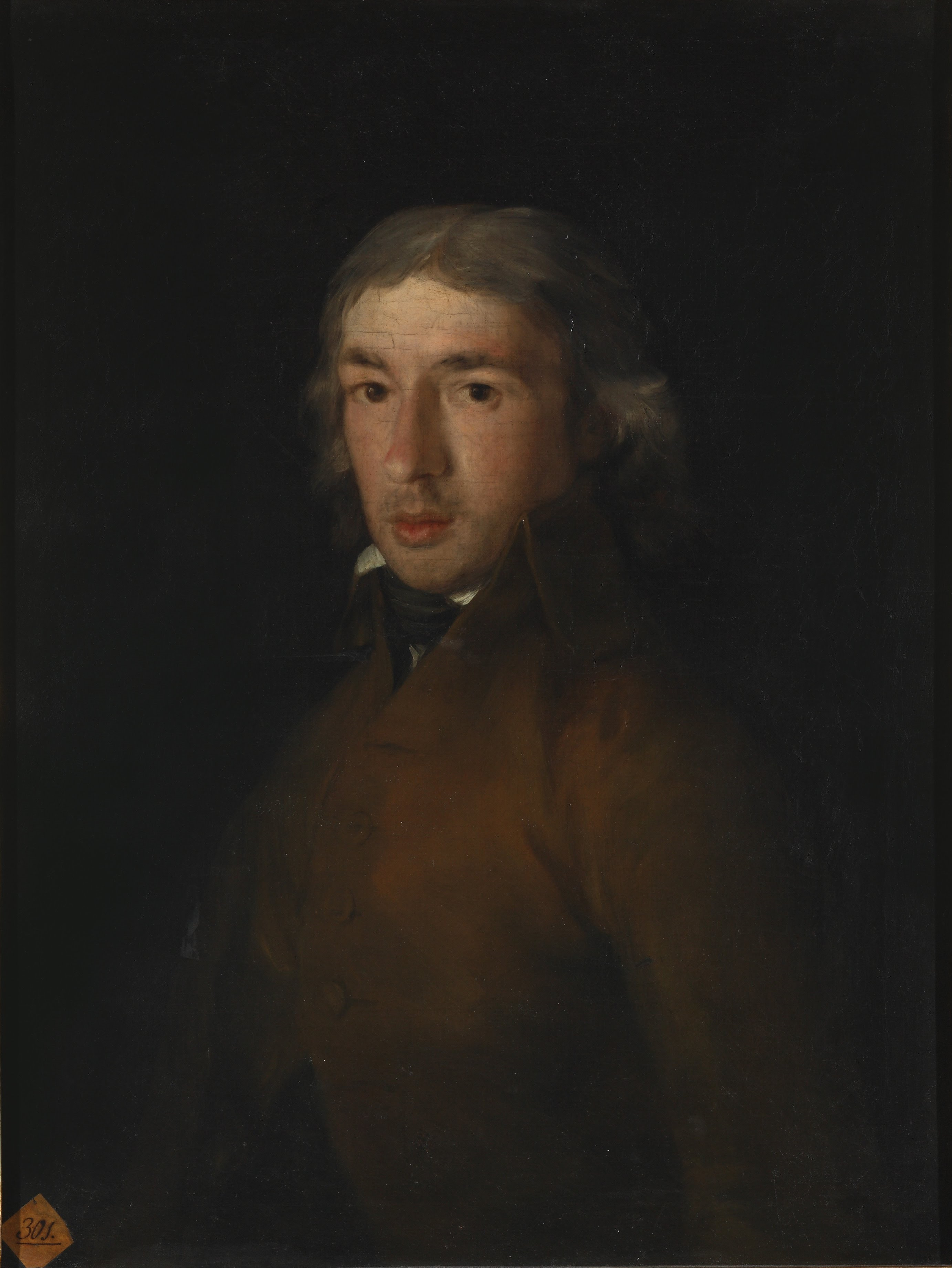 Retrato del dramaturgo y escritor español Leandro Fernández de Moratín (1760-1828).